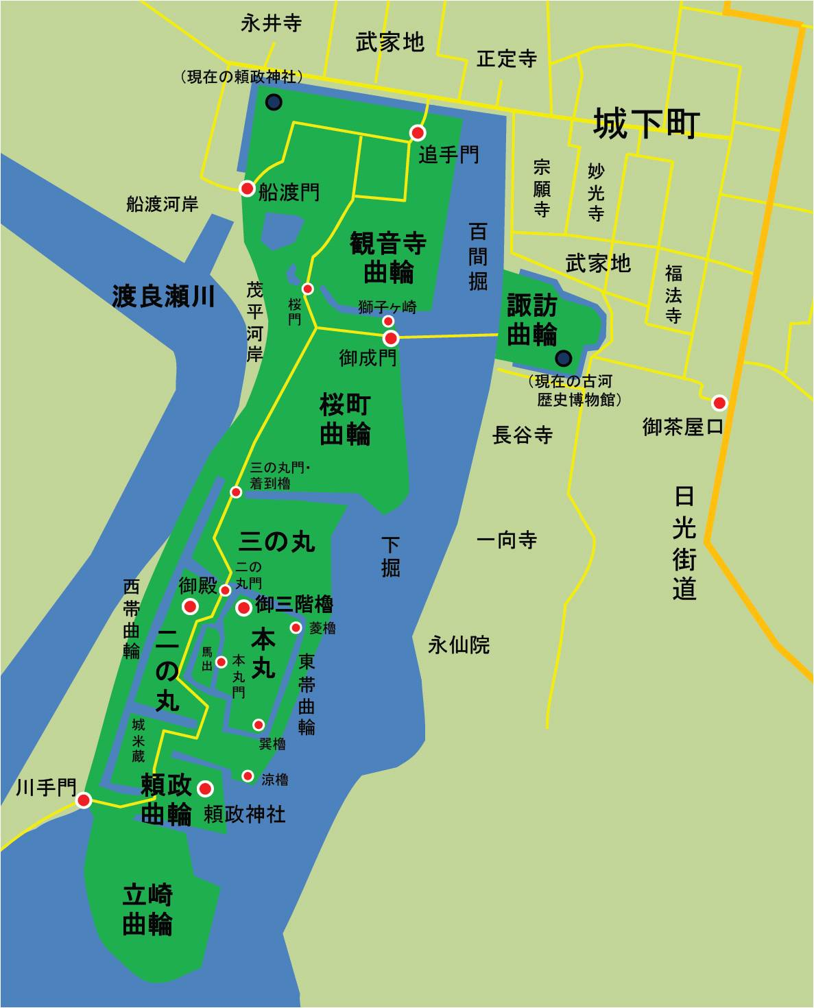 茨城県古河市にあった古河城の概要図